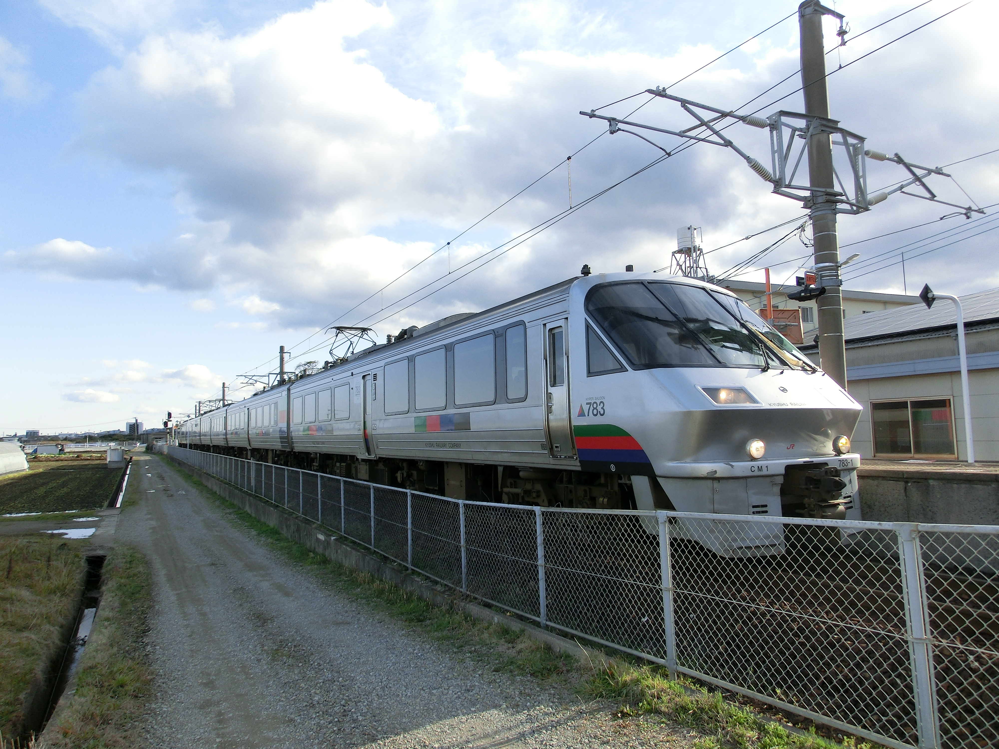 田吉駅で離合を待つ大分行「にちりん22号」